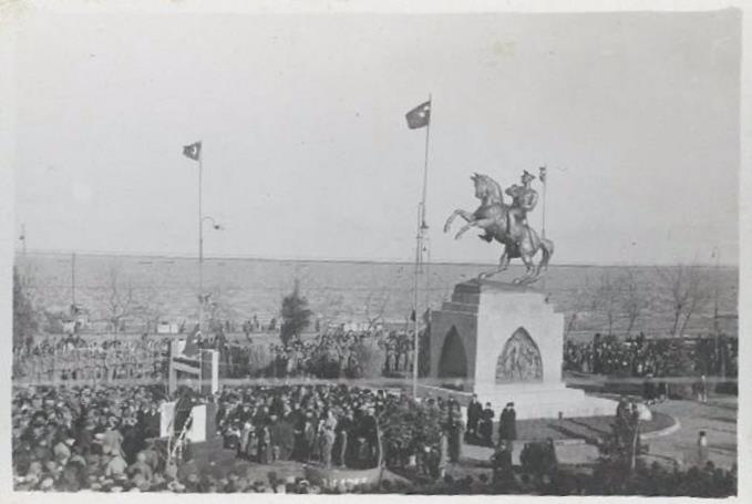 Onur Anıtı'nın çevresinde devam eden cumhuriyet bayramı kutlamaları.